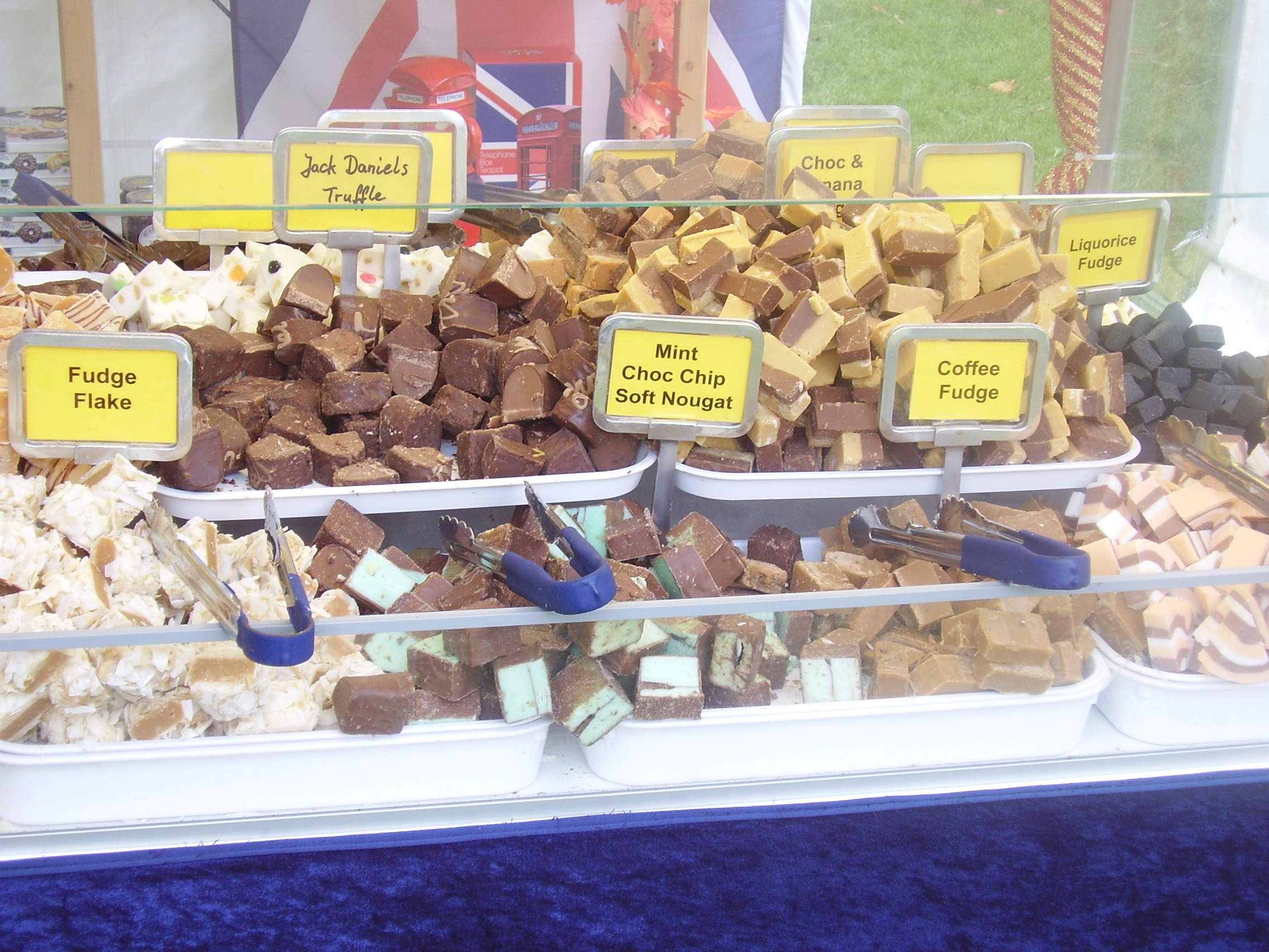 Fudge